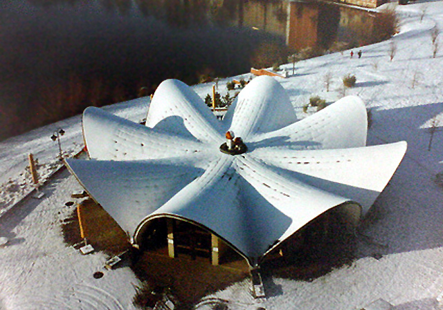 Die Seerose ist ein Café und Restaurant mit Blick auf die Neustädter Havelbucht in Potsdam. Es befindet sich in unmittelbarer Nähe zum Pumpwerk von Sanssouci, der Moschee in der Breiten Straße. Das Gebäude wurde vom Bauingenieur Ulrich Müther entworfen. Der geschwungene Betonschalenbau bietet einen Kontrast zu den umgebenden Hochhäusern.